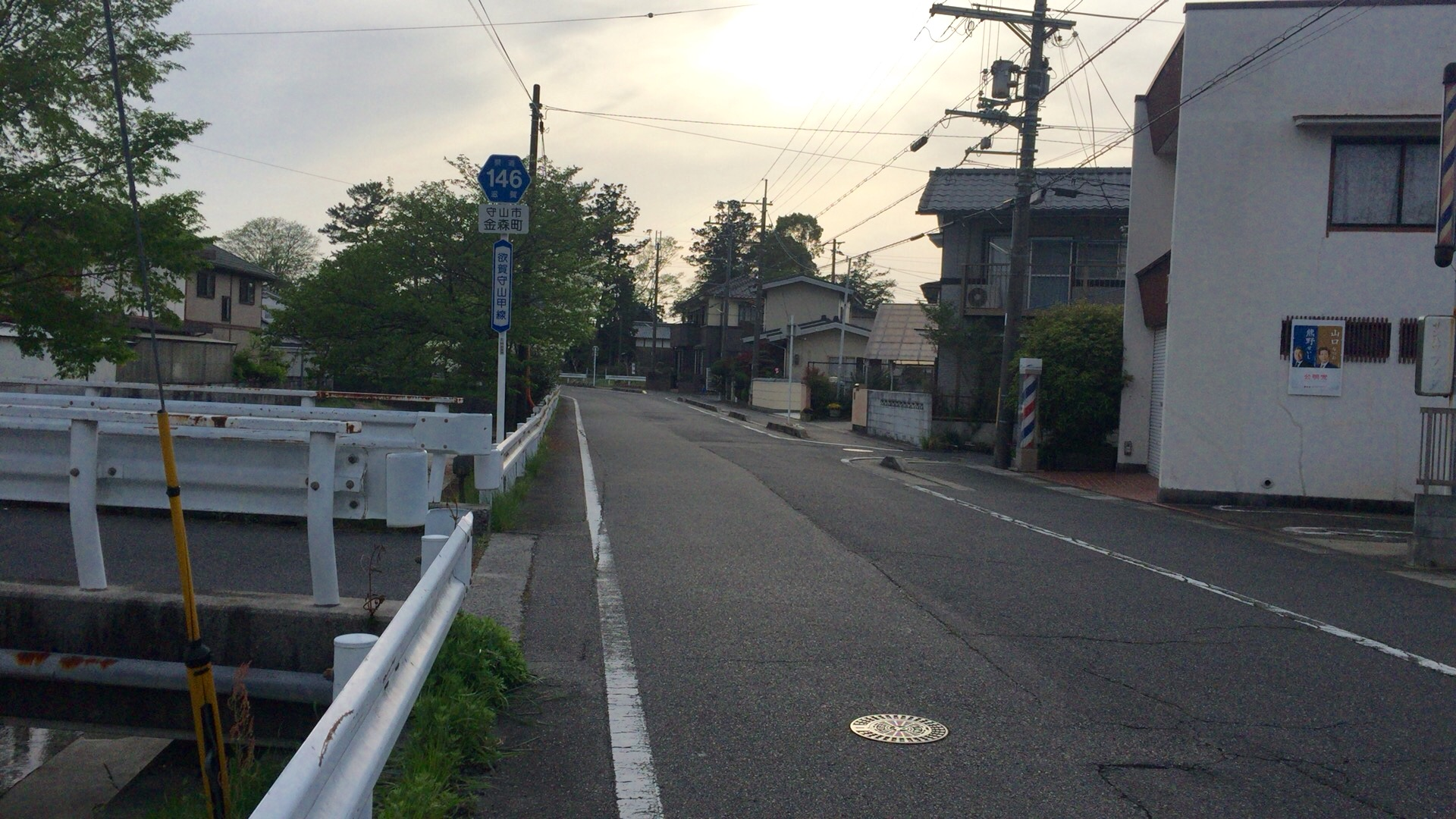 滋賀県道146号欲賀守山甲線で、守山市金森町（かねがもりちょう）